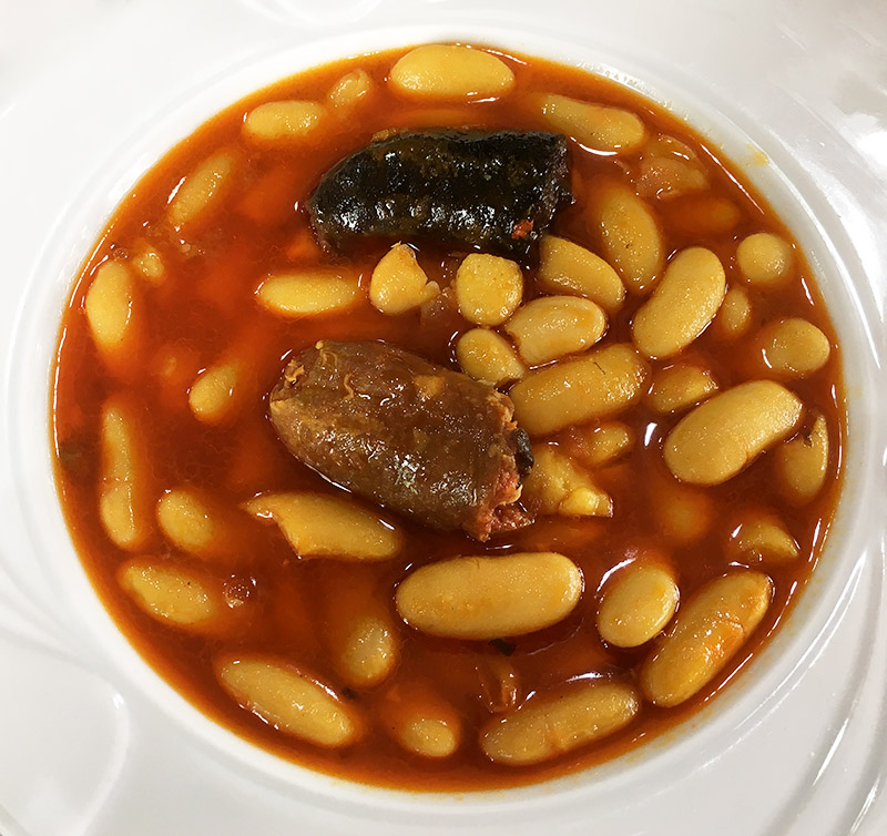 Fabada